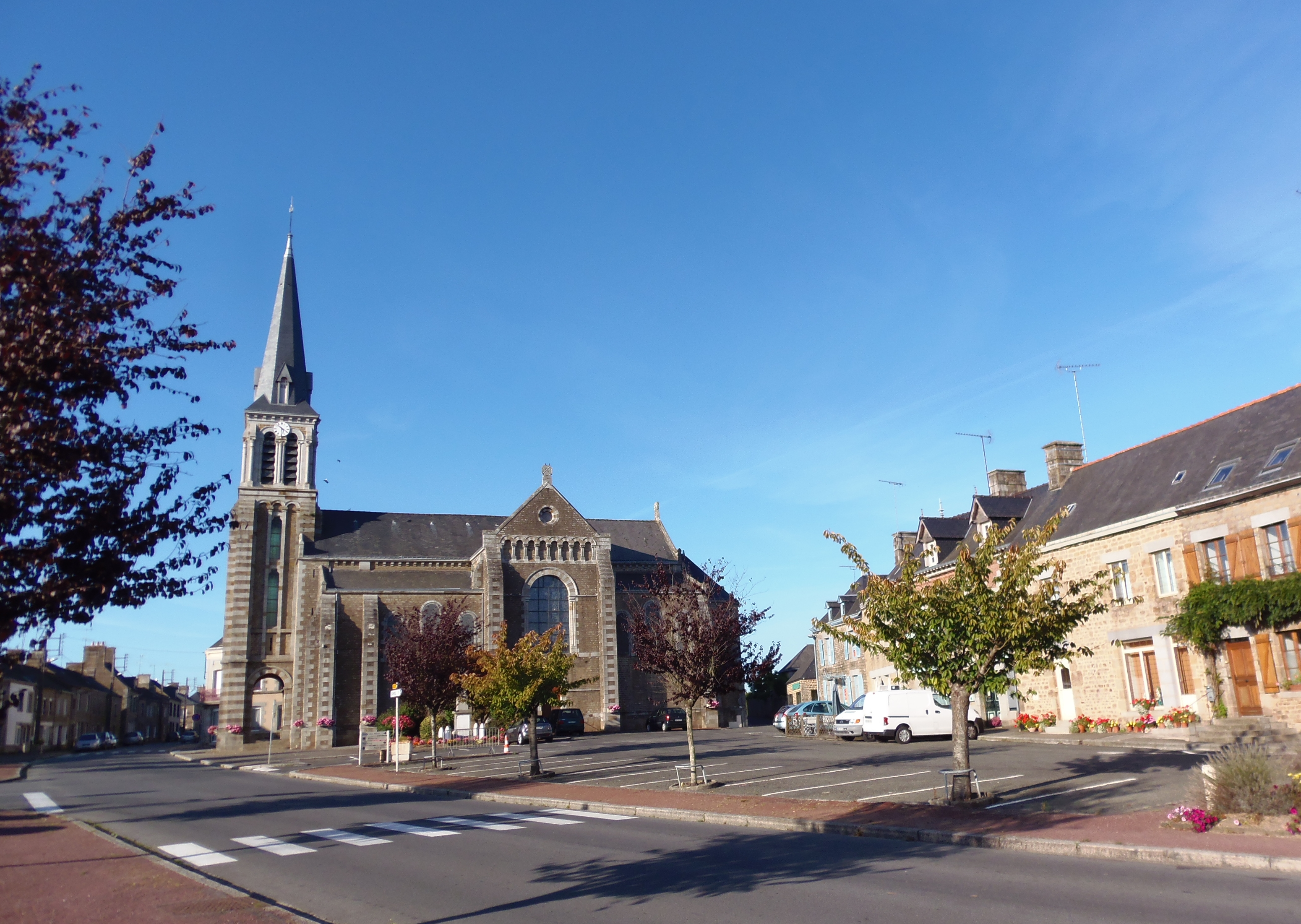 Montaudin (Pays de la Loire, France). L'église Notre-Dame.